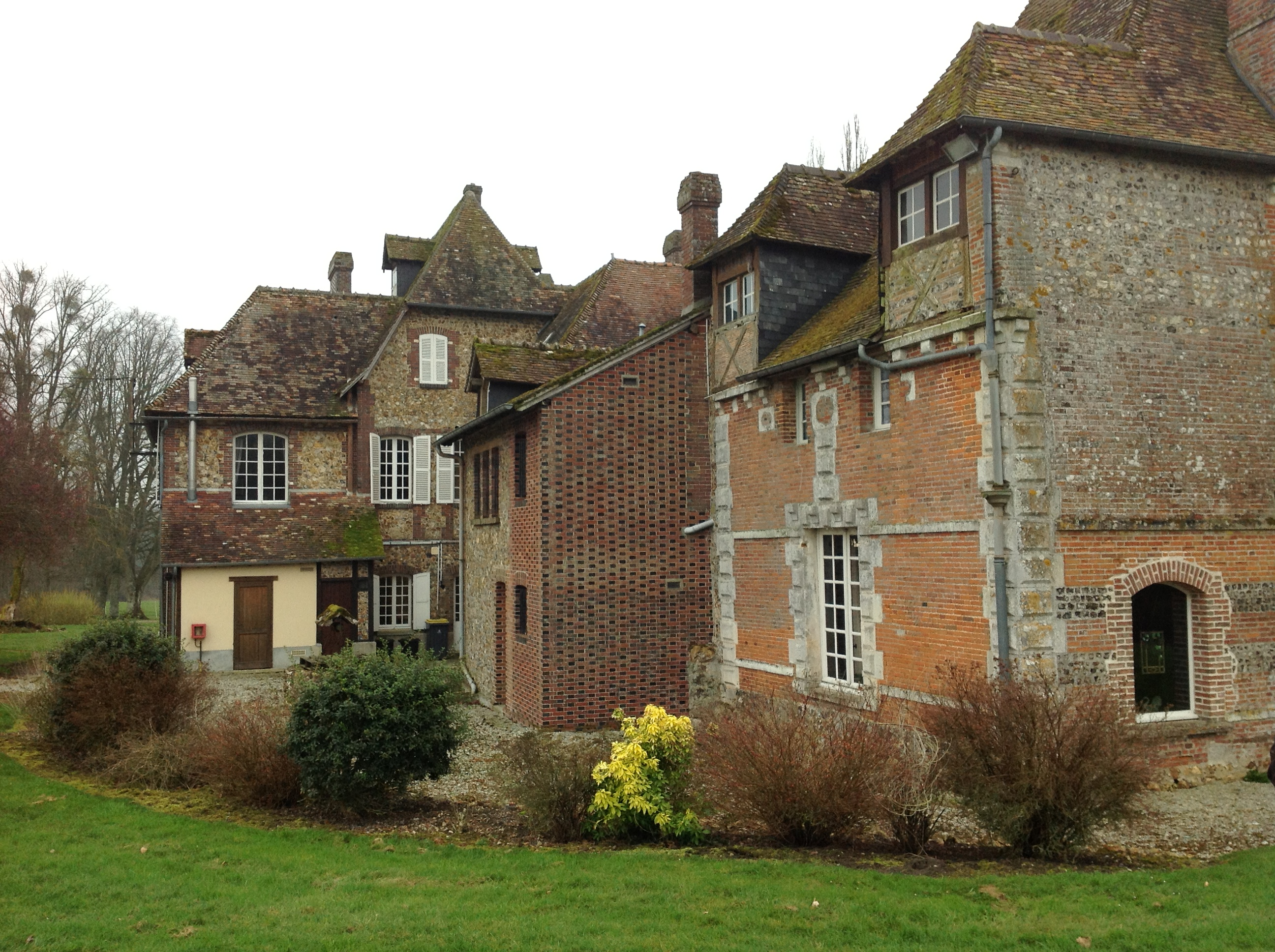 CHATEAU DE ST AUBIN SUR RISLE